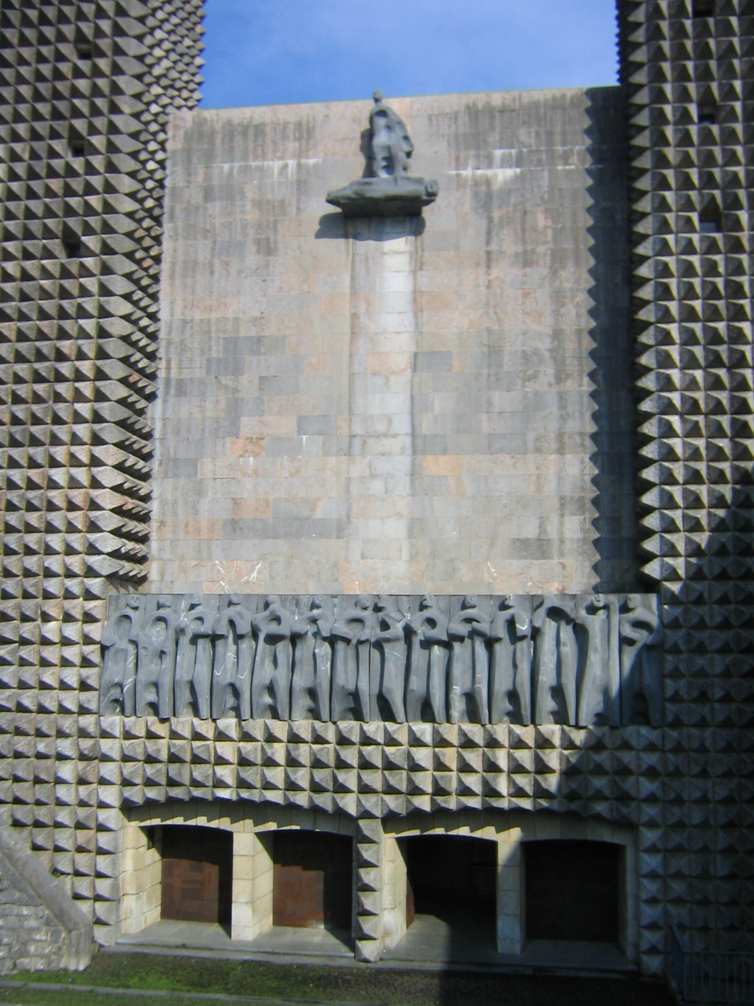 Irudia/Image: Arantzazu santutegia, Oñati, Gipuzkoa